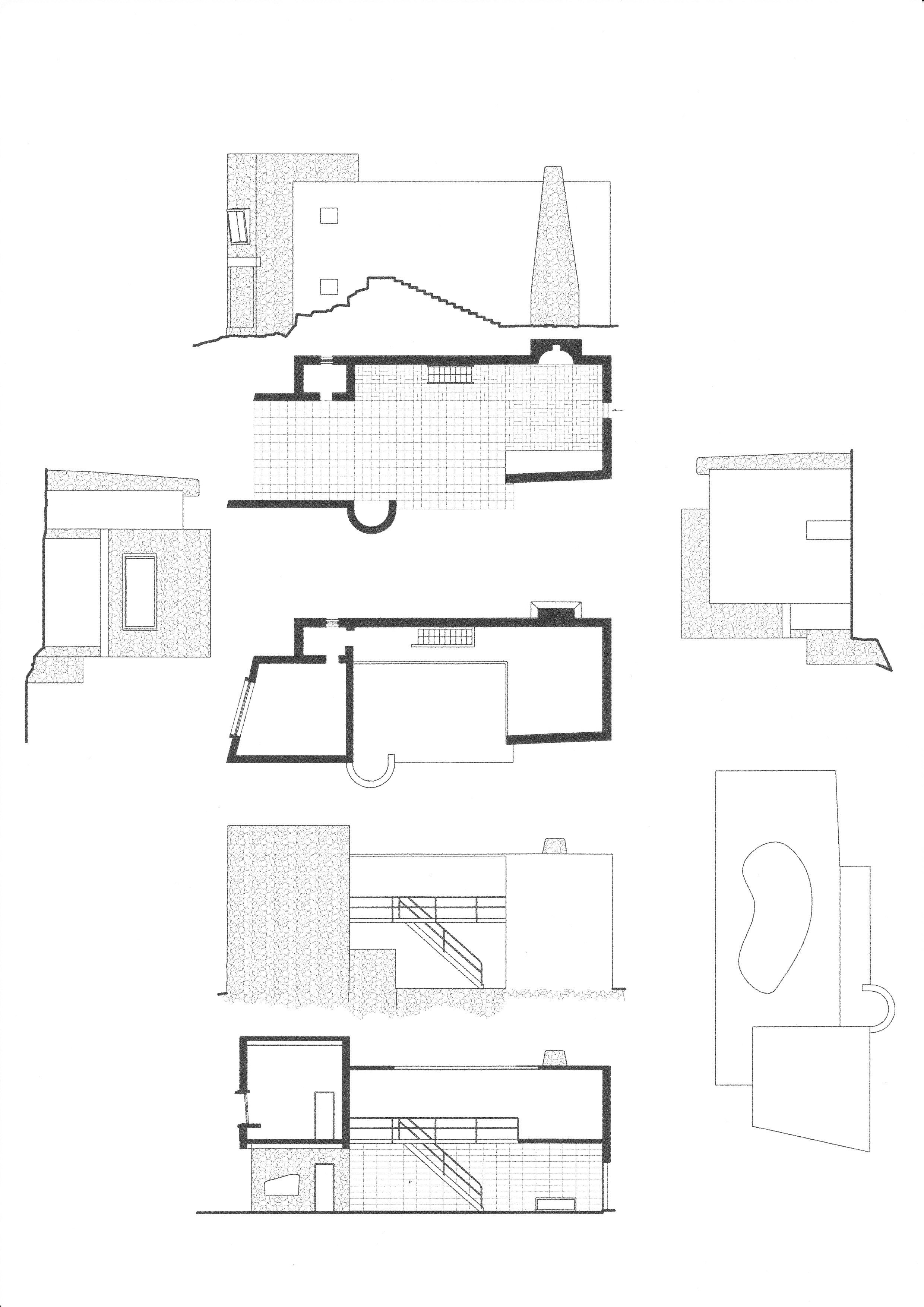 Villa a Positano, Luigi Cosenza e Bernard Rudofsky.